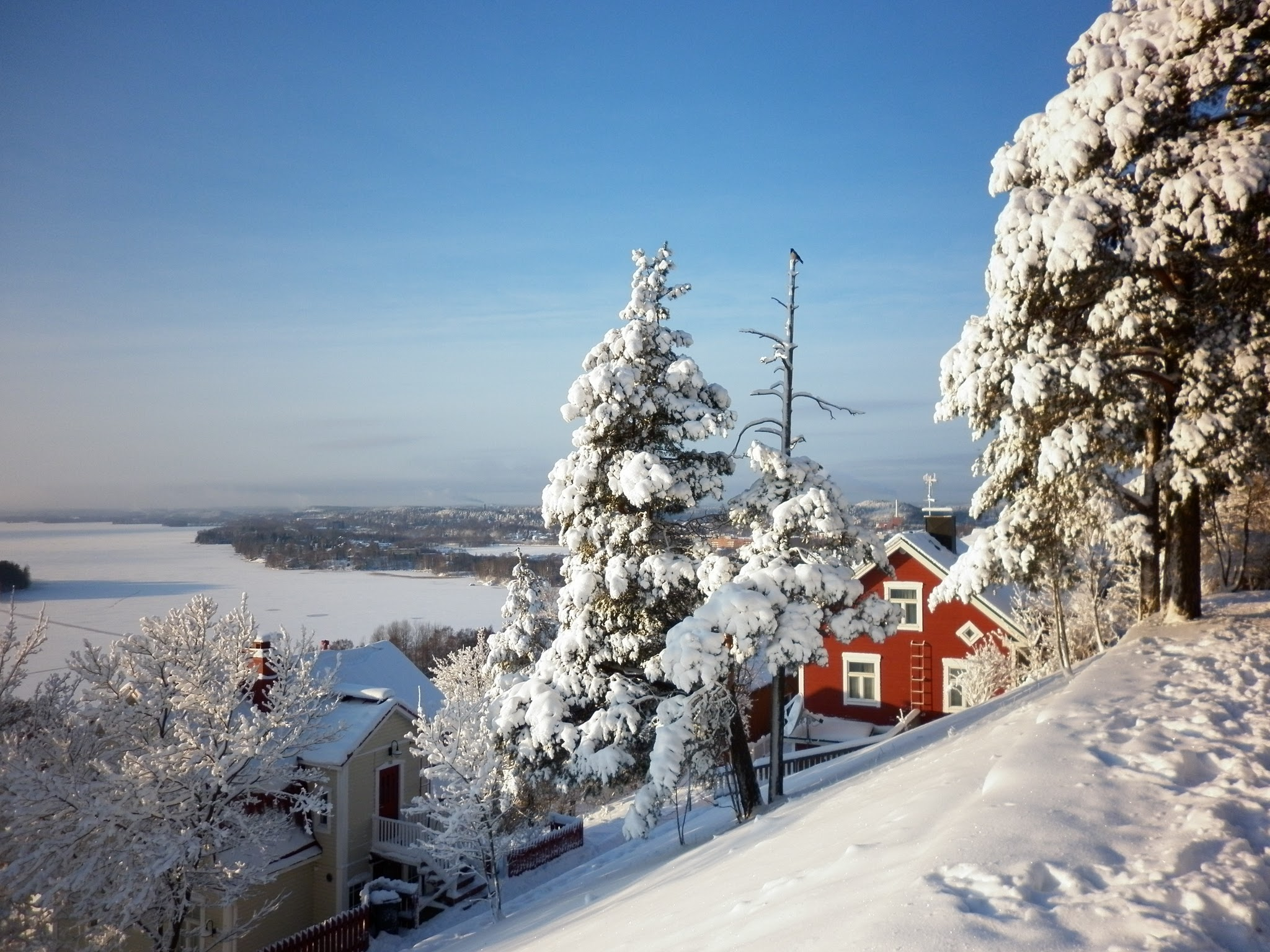 Pispalan harjulta, punainen pääty